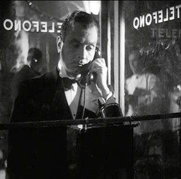 Ángel Magaña. Foto durante la filmación de la película No abras esa puerta (1952).